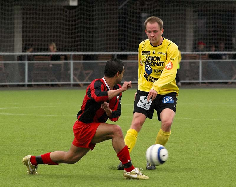 Defensive midfielder Olli Kosonen of KuPS. Game KuPS-PK-35 at Magnum Areena, Kuopio. Game ended 2-1.